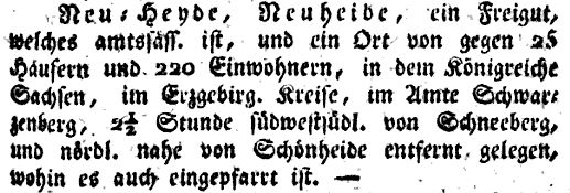 August Schumann schrieb im 1820 erschienenen 7. Band seines Staats-, Post- und Zeitungslexikons von Sachsen: Neu-Heyde, Neuheide, ein Freigut, welches amtssässig ist, und ein Ort von gegen 25 Häusern und 220 Einwohnern, in dem Königreiche Sachsen, im Erzgebirgischen Kreise, im Amte Schwarzenberg, und nördlich nahe von Schönheide entfernt gelegen, wohin es auch eingepfarrt ist. (August Schumann. Staats-, Post- und Zeitungslexikon von Sachsen, Band 7, Verlag der Gebrüder Schumann, Zwickau 1820, Seite 65 [1] Digitalisat, abgerufen am 3. August 2014)